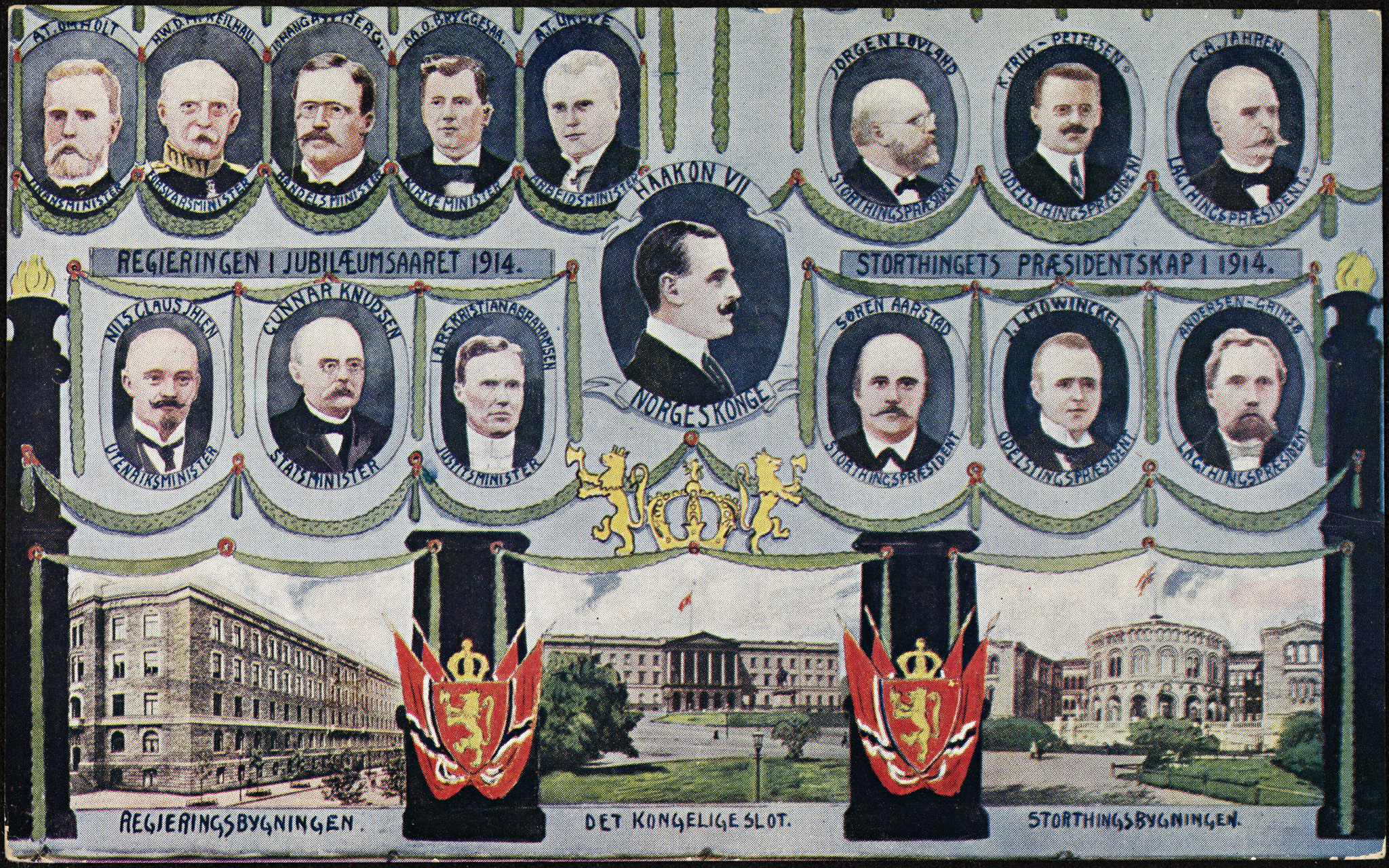 Tittel / Title: Jubilæumsaaret 1914 Beskrivelse / Description: Postkort. Regjeringen i jubileumsåret 1914. Stortingets presidentskap i 1914. Kunstner / Artist: ukjent / unknown Utgiver / Publisher: J. H. K. A.S. Utgitt / Published: 1914 Sted / Place: Oslo Eier / Owner Institution: Nasjonalbiblioteket / National Library of Norway Lenke / Link: Bildesignatur / Image Number: blds_05713